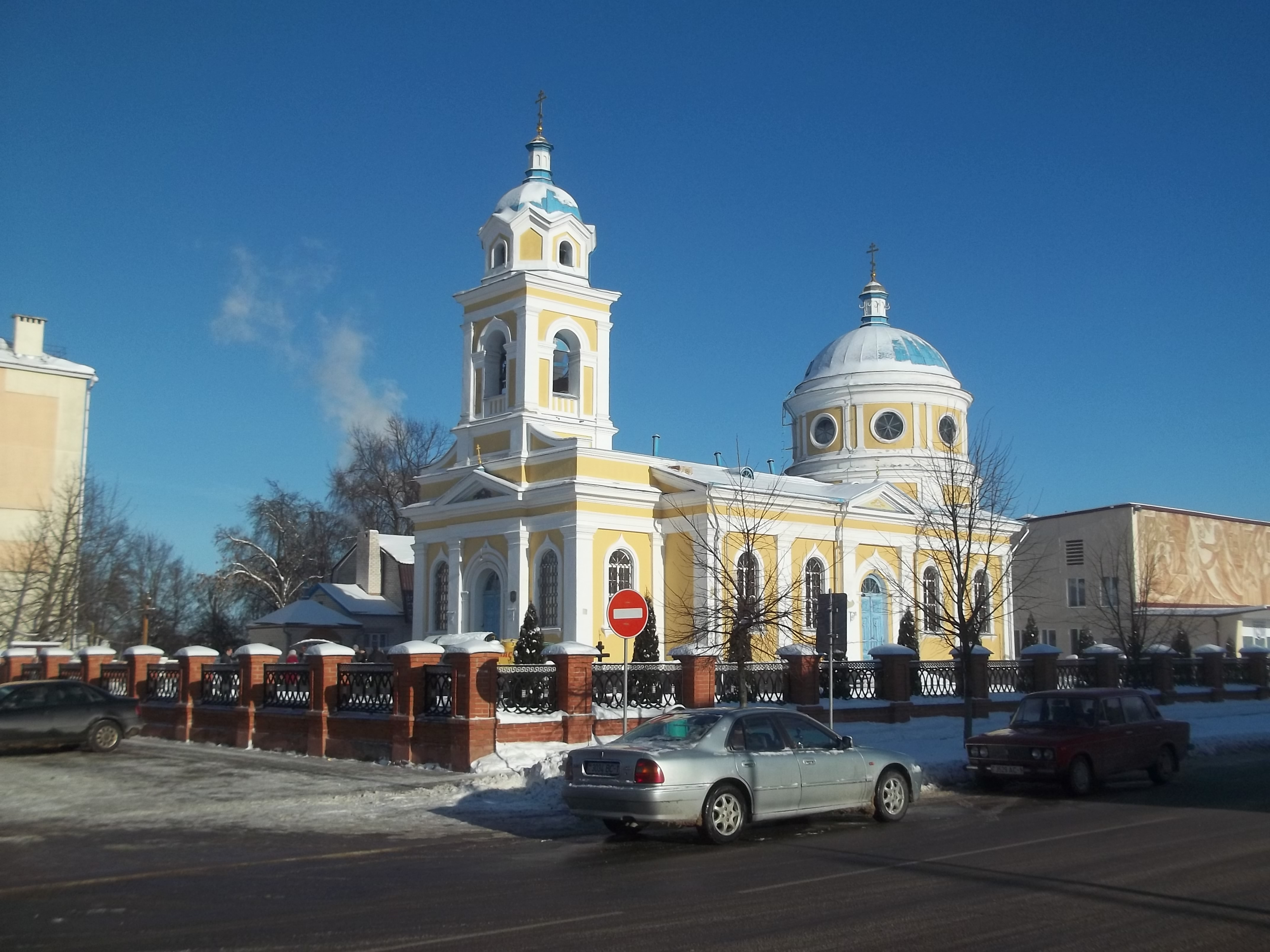 Церковь